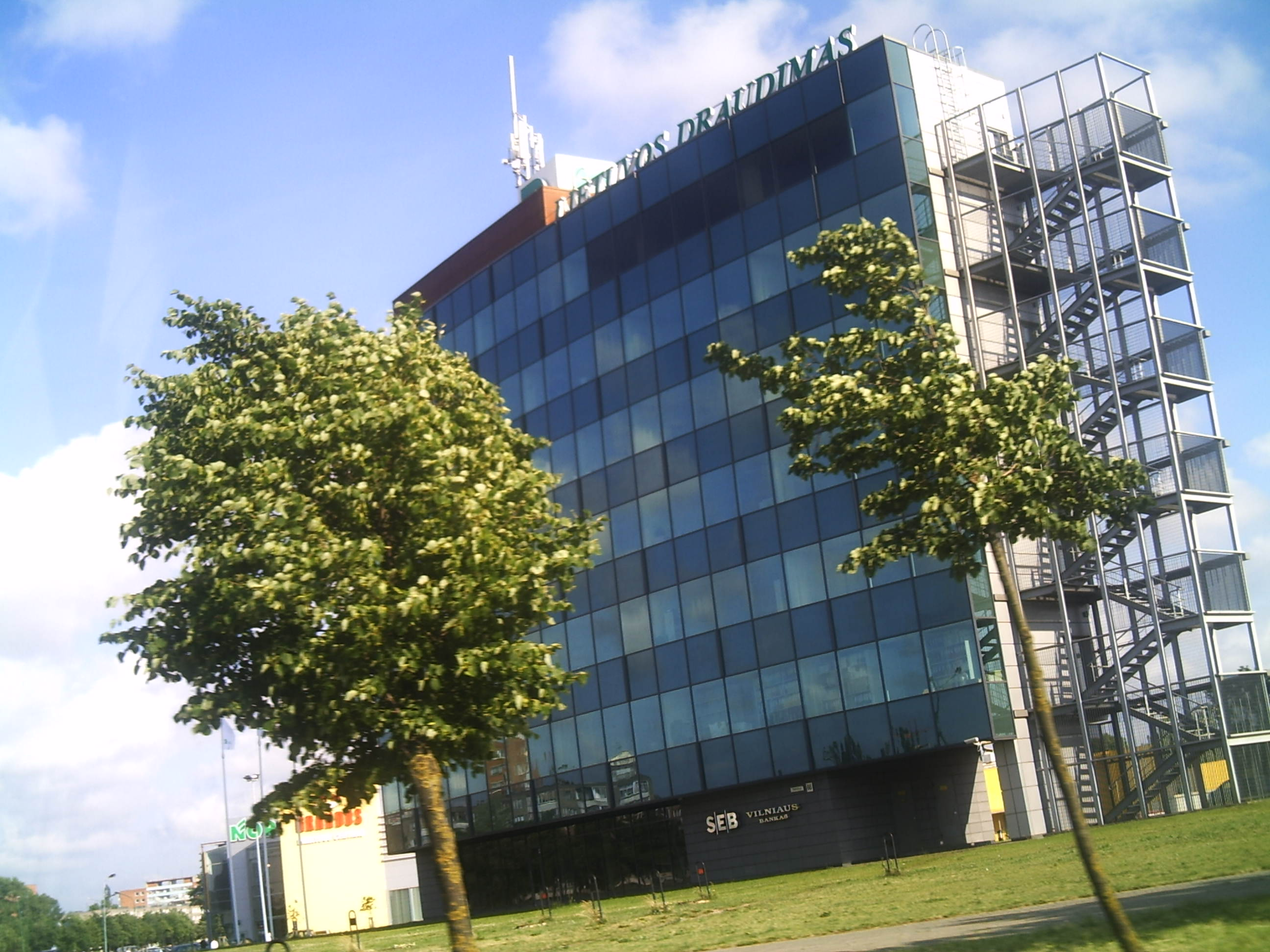 Lietuvos Draudimas building in Klaipėda, Lithuania